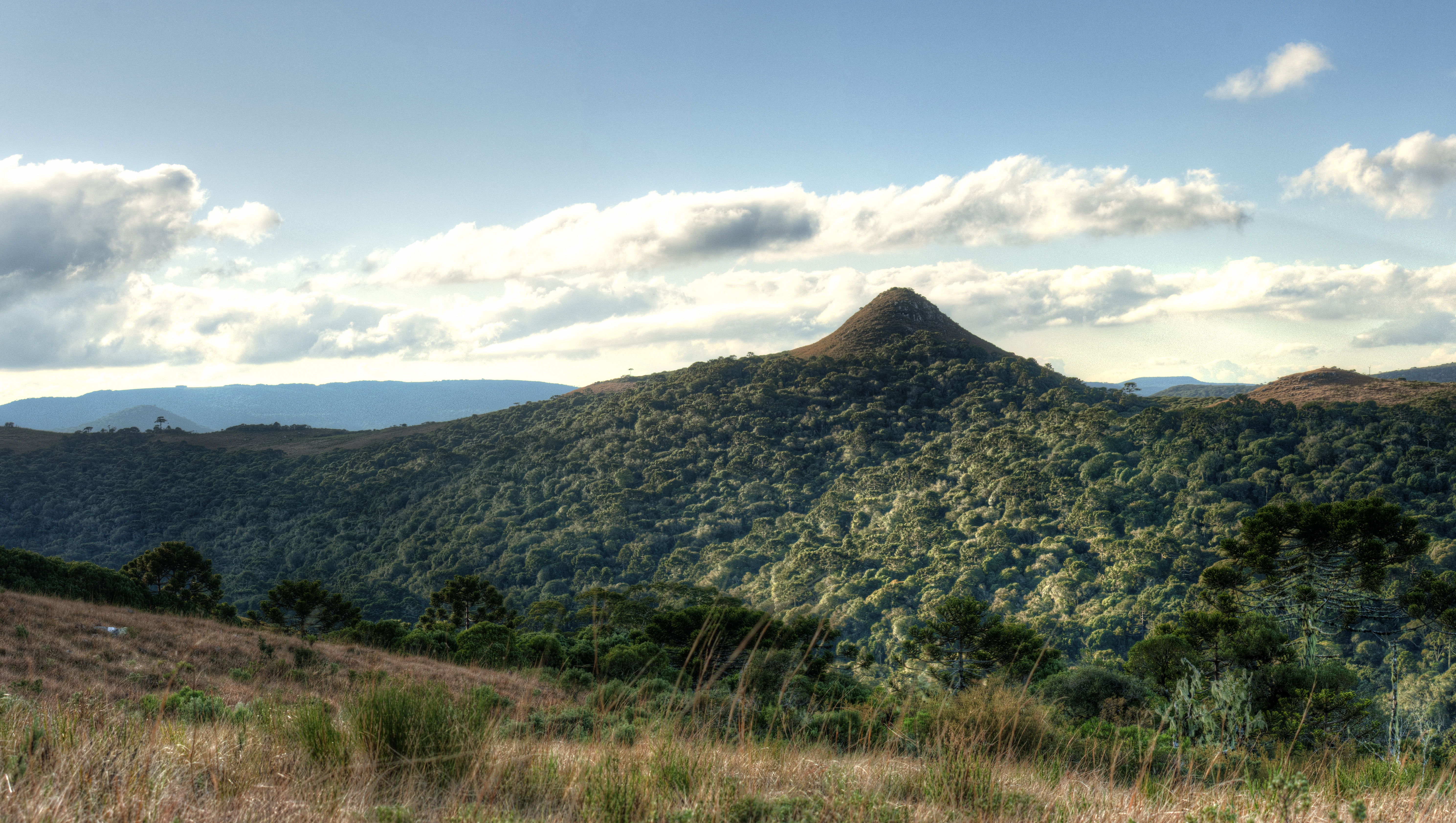 A Floresta Ombrófila Mista Alto Montana é um tipo de floresta comum no Parque Nacional de São Joaquim. Nela encontra-se além da Araucária, outras espécies típicas destas matas, como a casca-de-anta e o brinco-de-princesa-da-mata.